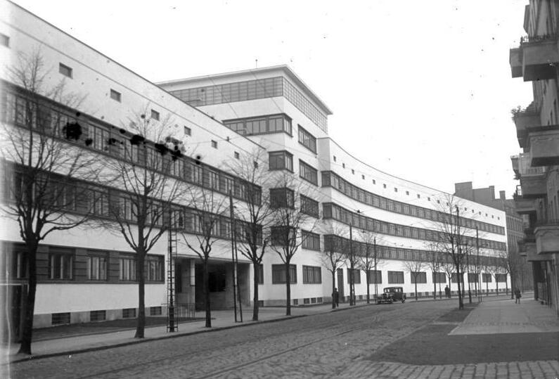 Deutschlands modernste Polizeiunterkunft geht in Berlin-Cöpenick ihrer Vollendung entgegen. Blick auf die Polizeiunterkunft in Berlin-Cöpenick, welche nach den modernsten Grundsätzen für den Polizeibetrieb erbaut wurde.